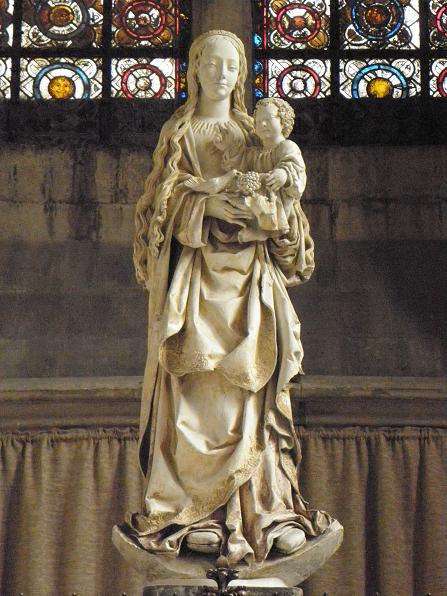 Vierge à l'Enfant aux raisins de la basilique Saint-Urbain de Troyes (10).